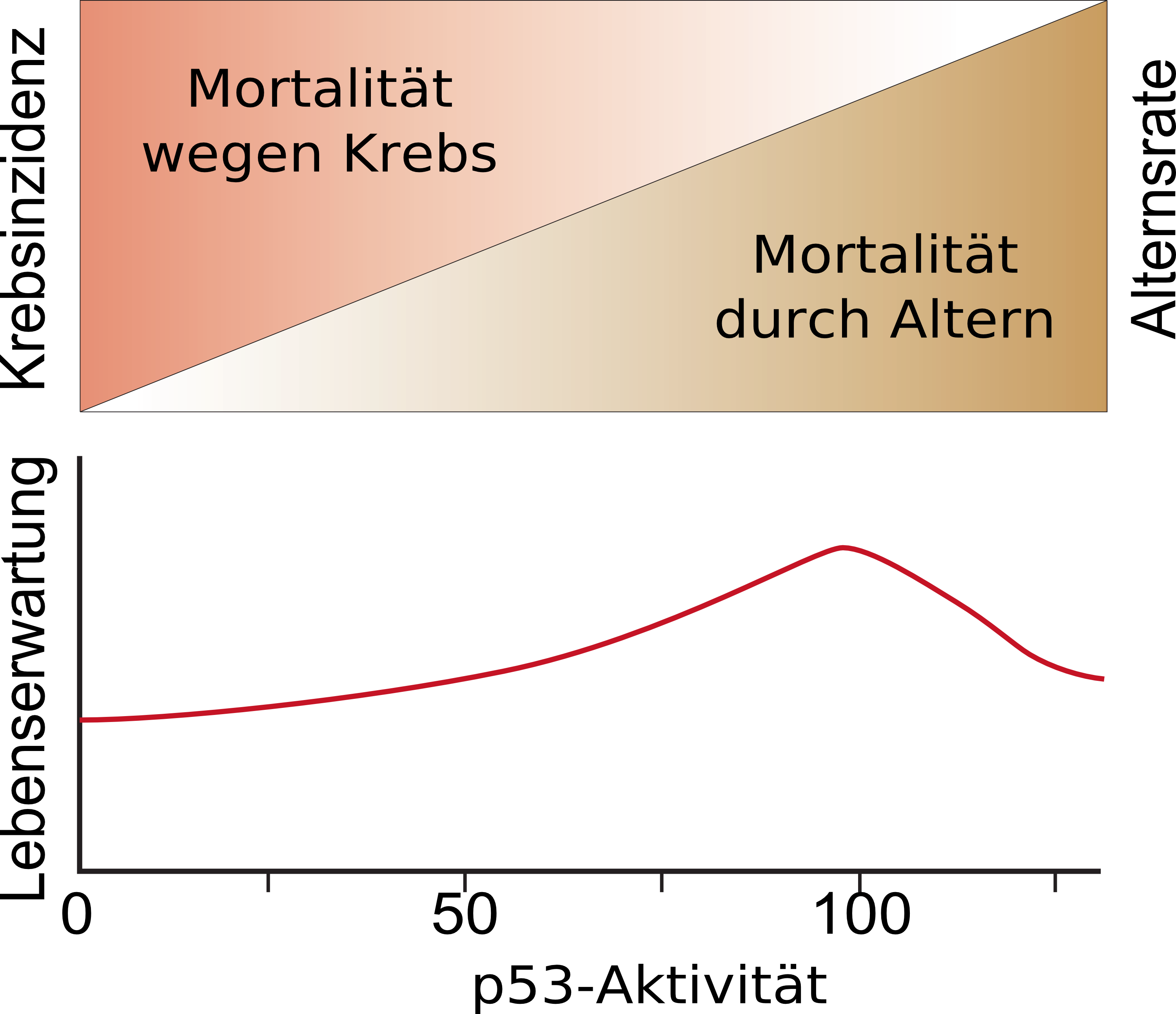 Der mögliche Einfluss der Expression des Tumorsuppressorgens p53 auf das Altern und die Entstehung von Krebs. Nach (Source): G. Ferbeyre und S. W. Lowe: Aging: The price of tumour suppression? In: Nature 415, 2002, S. 26–27. PMID 11780097